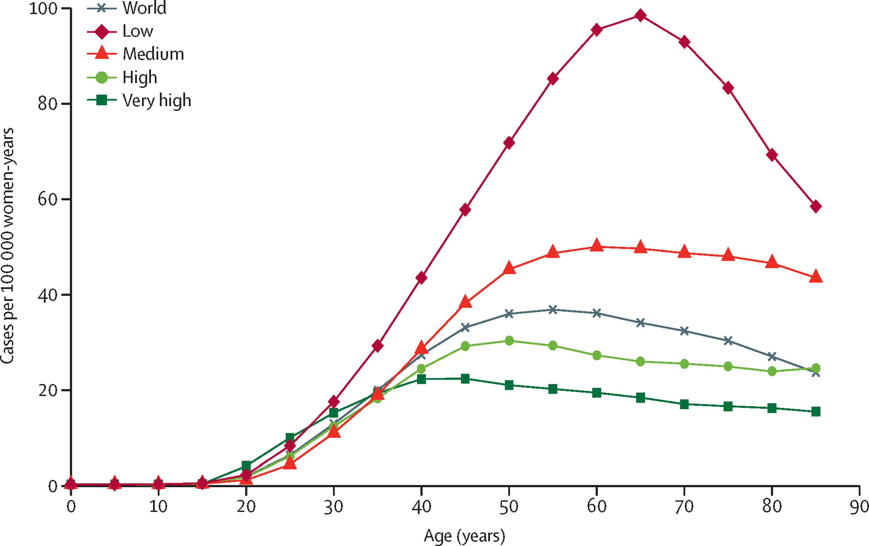 Ce fichier démontre que ce cancer est lié avec la richesse du pays. Plusieurs causes peuvent expliquer les différences.